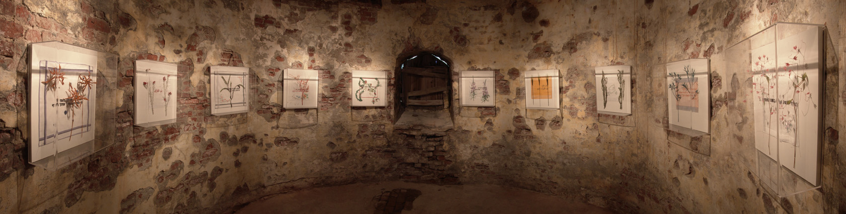 מבט פנורמי על התערוכה דם המכבים